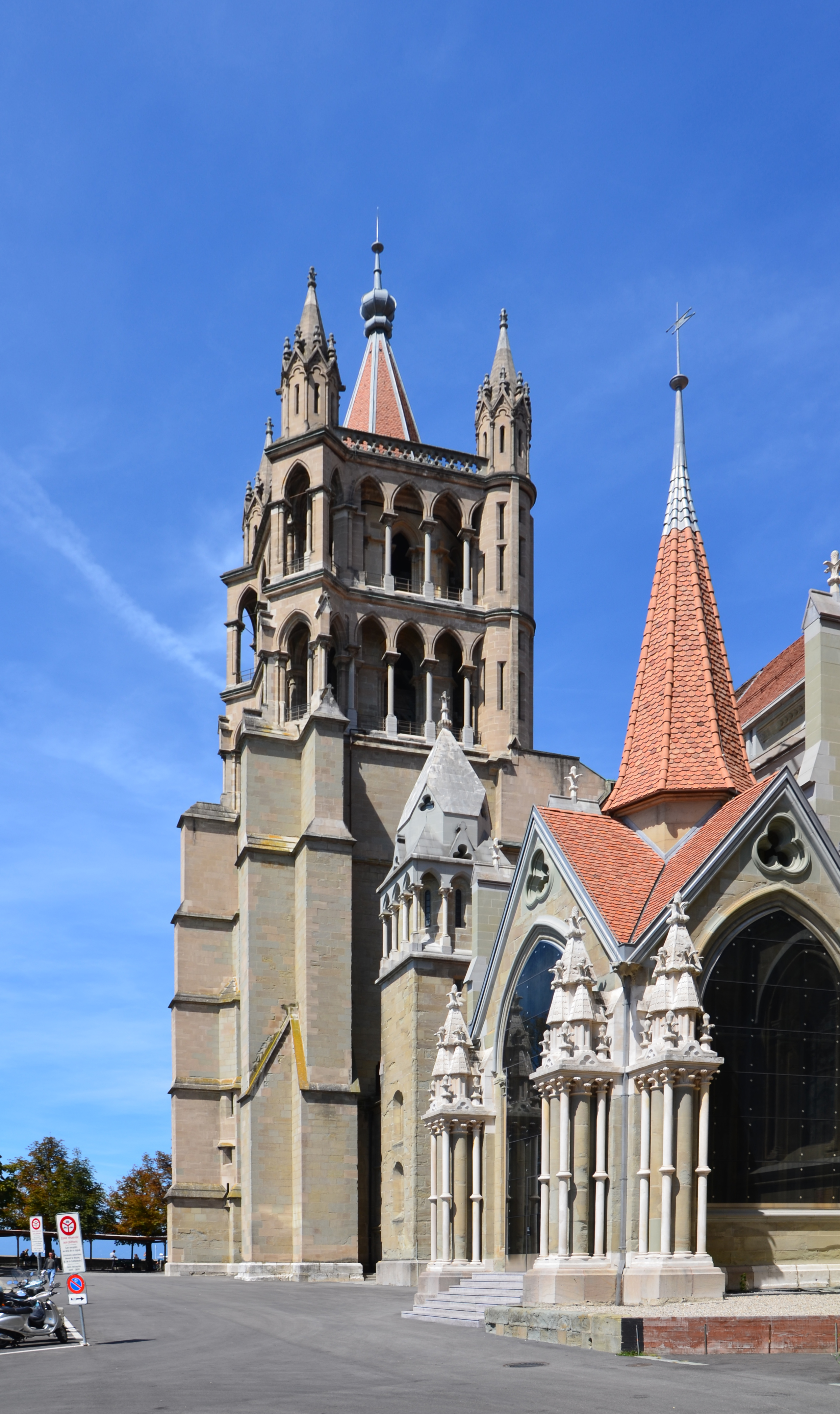 Clocher de la cathédrale de Lausanne (Suisse)